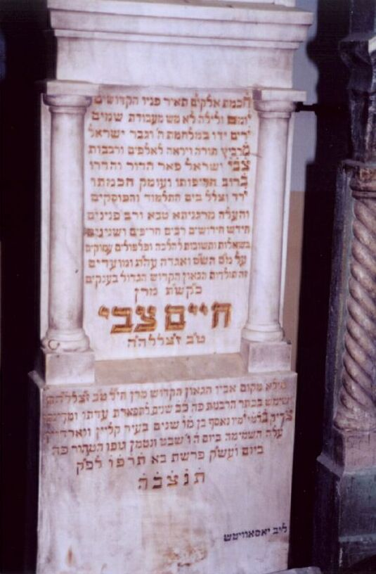 Tombsrone of Rabbi Chaim Tzvi Teitelbaum